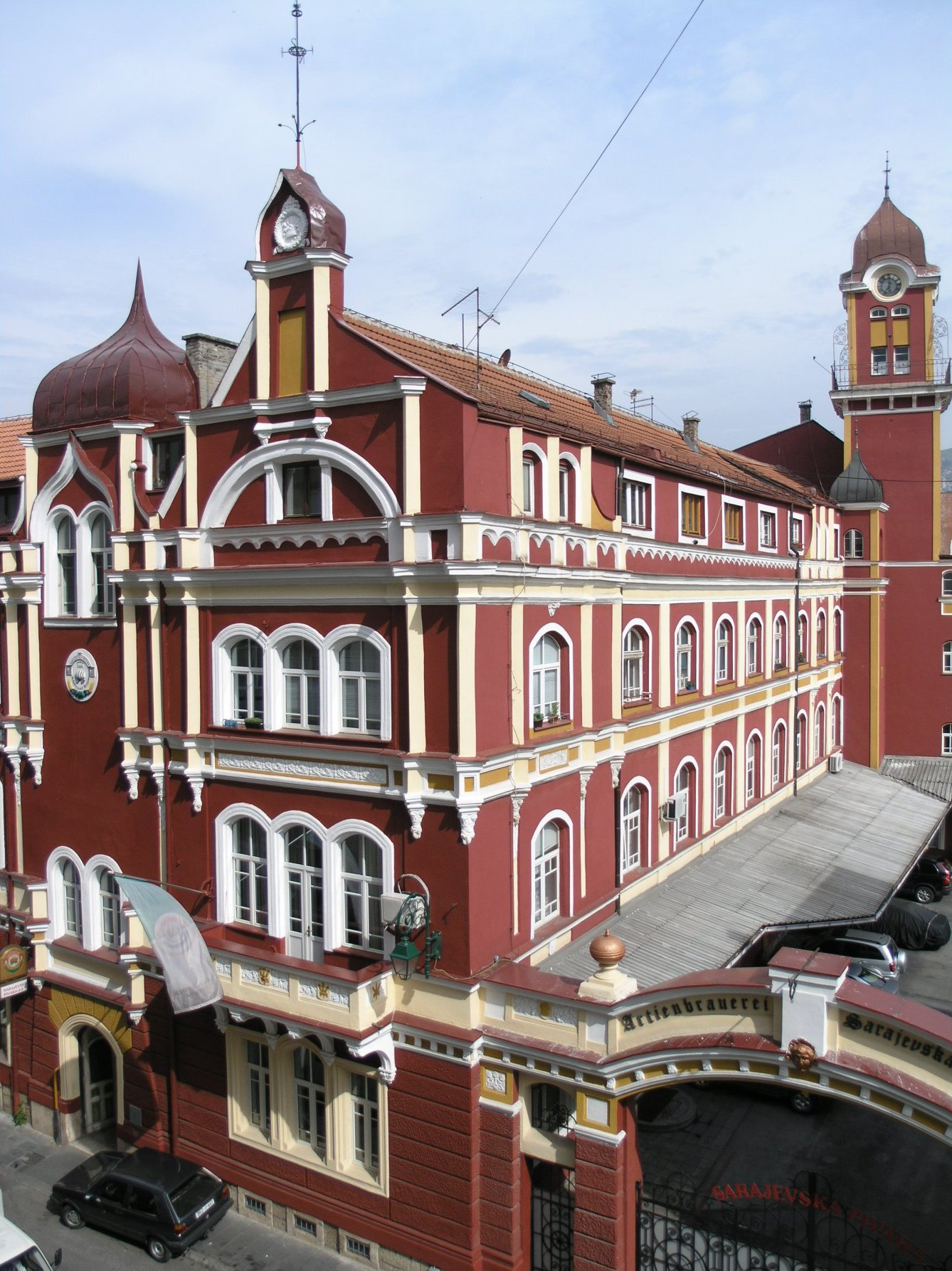 BiH, Sarajevo - brewery